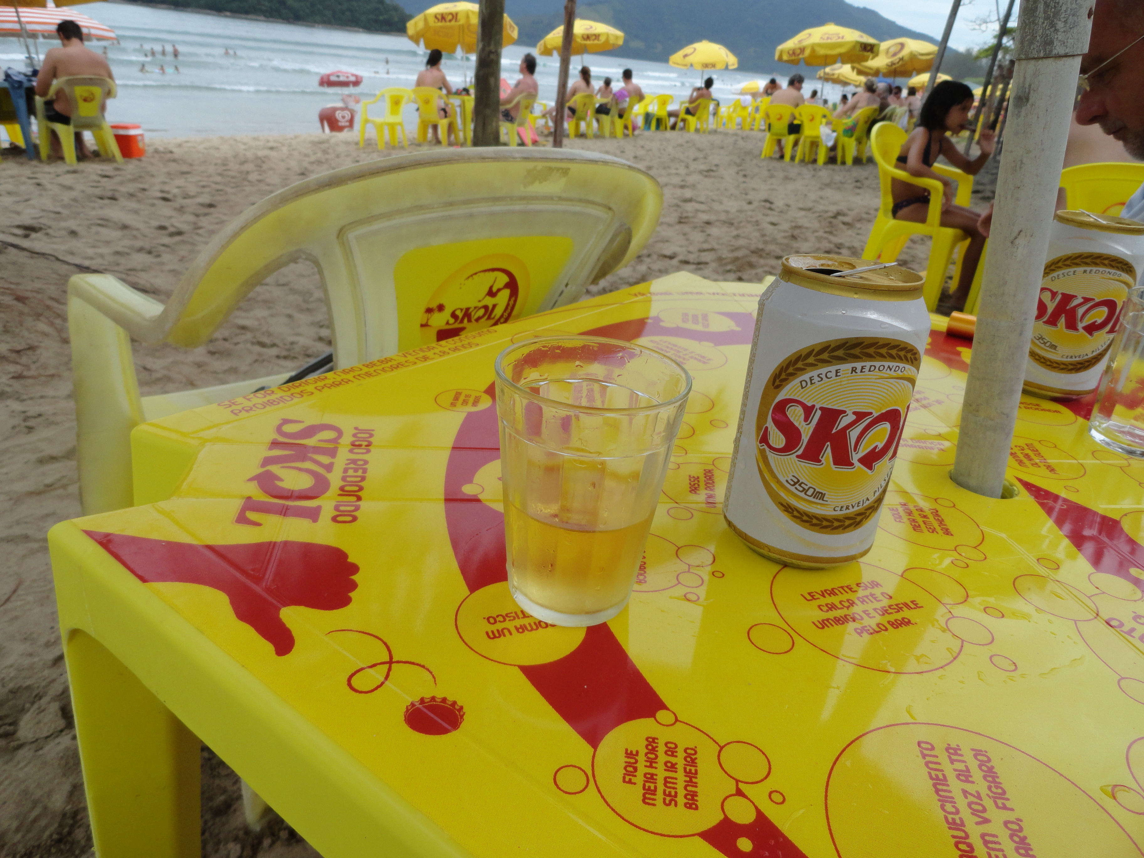 Skol